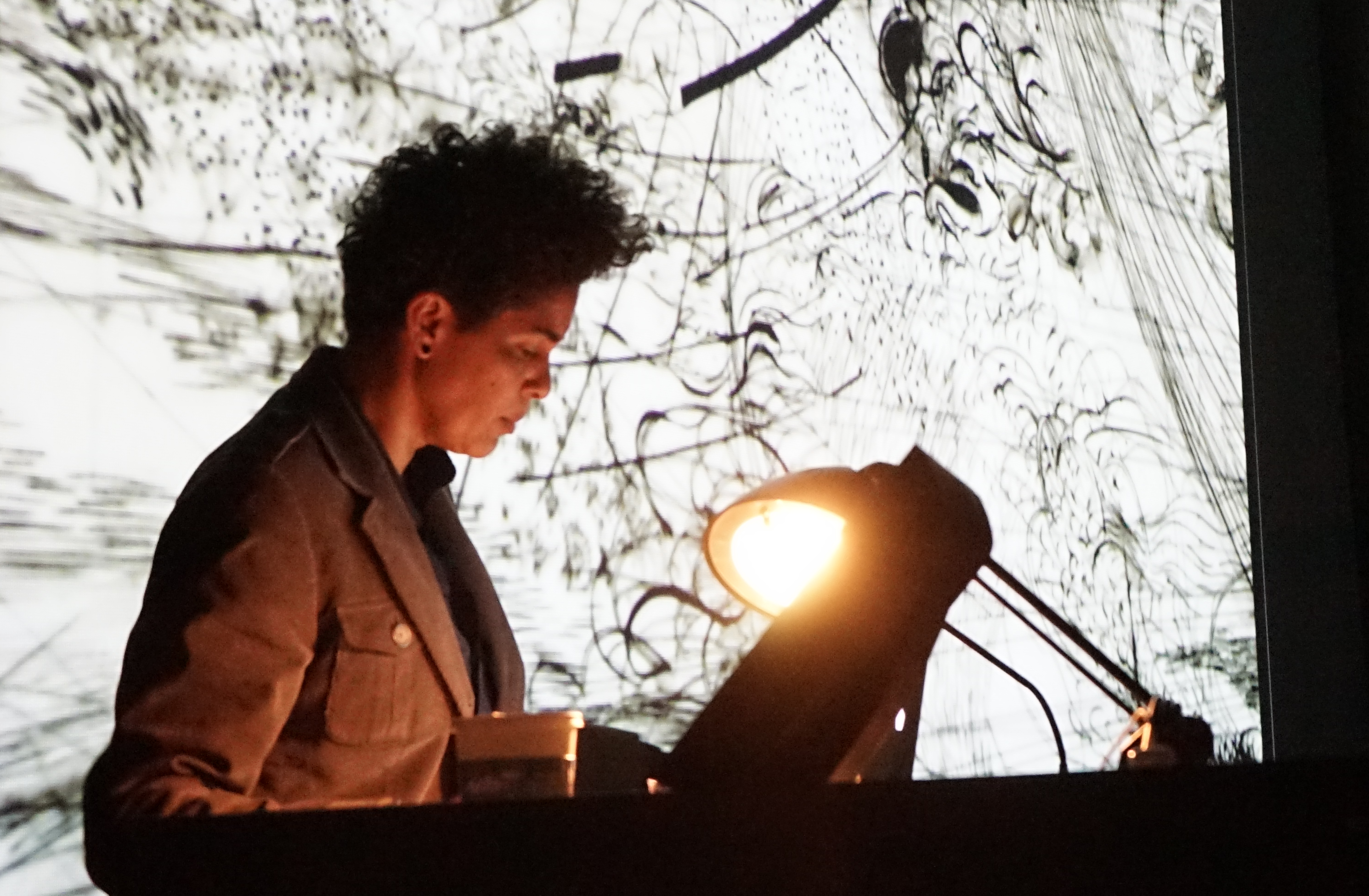 Painter: Divergent Lines, Emergent Spaces (Julie Mehretu)